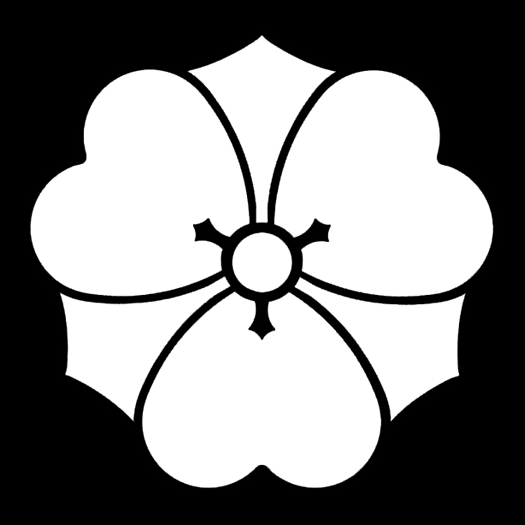 「剣片喰」紋（染抜）